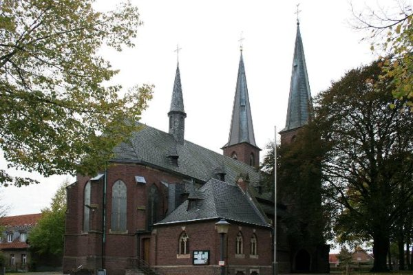 Denkmal Nr. 34 in Schwalmtal-Amern